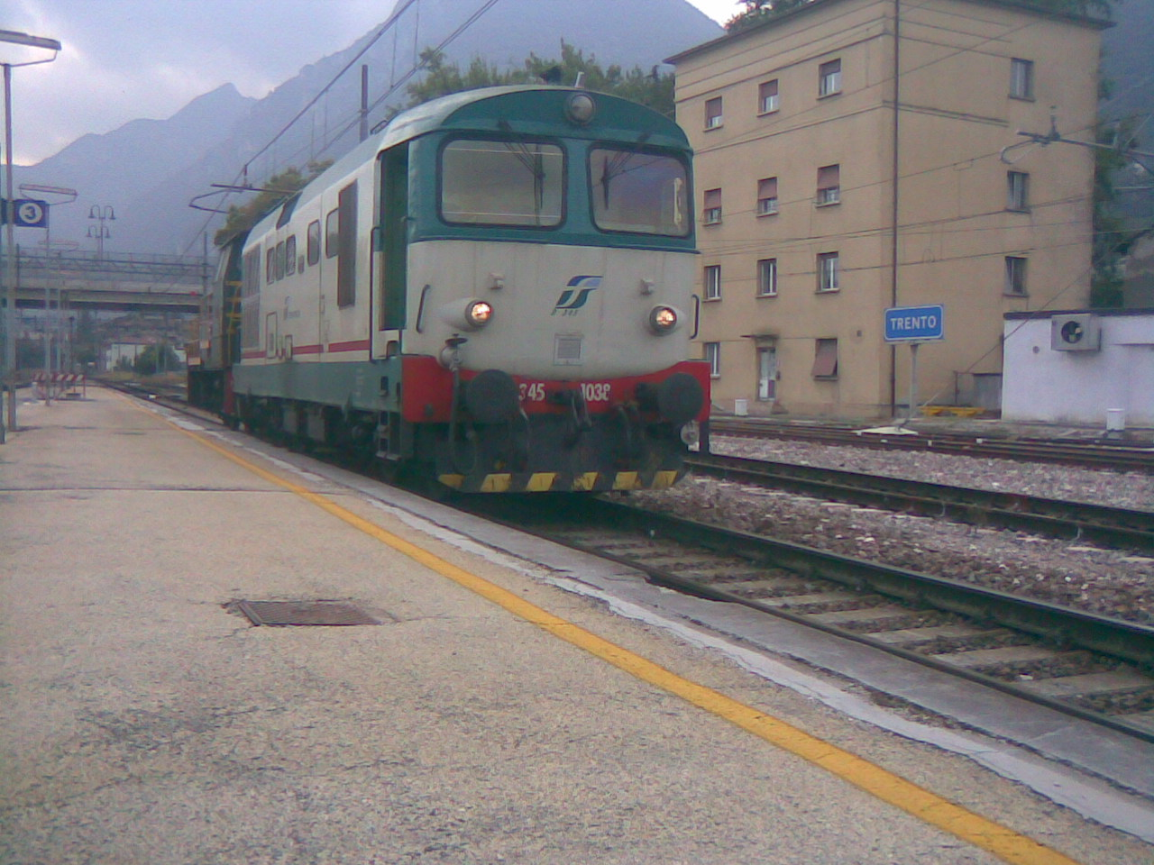 Locomotiva D345 accoppiata con una D245 in attesa sul 3° binario presso la stazione di Trento